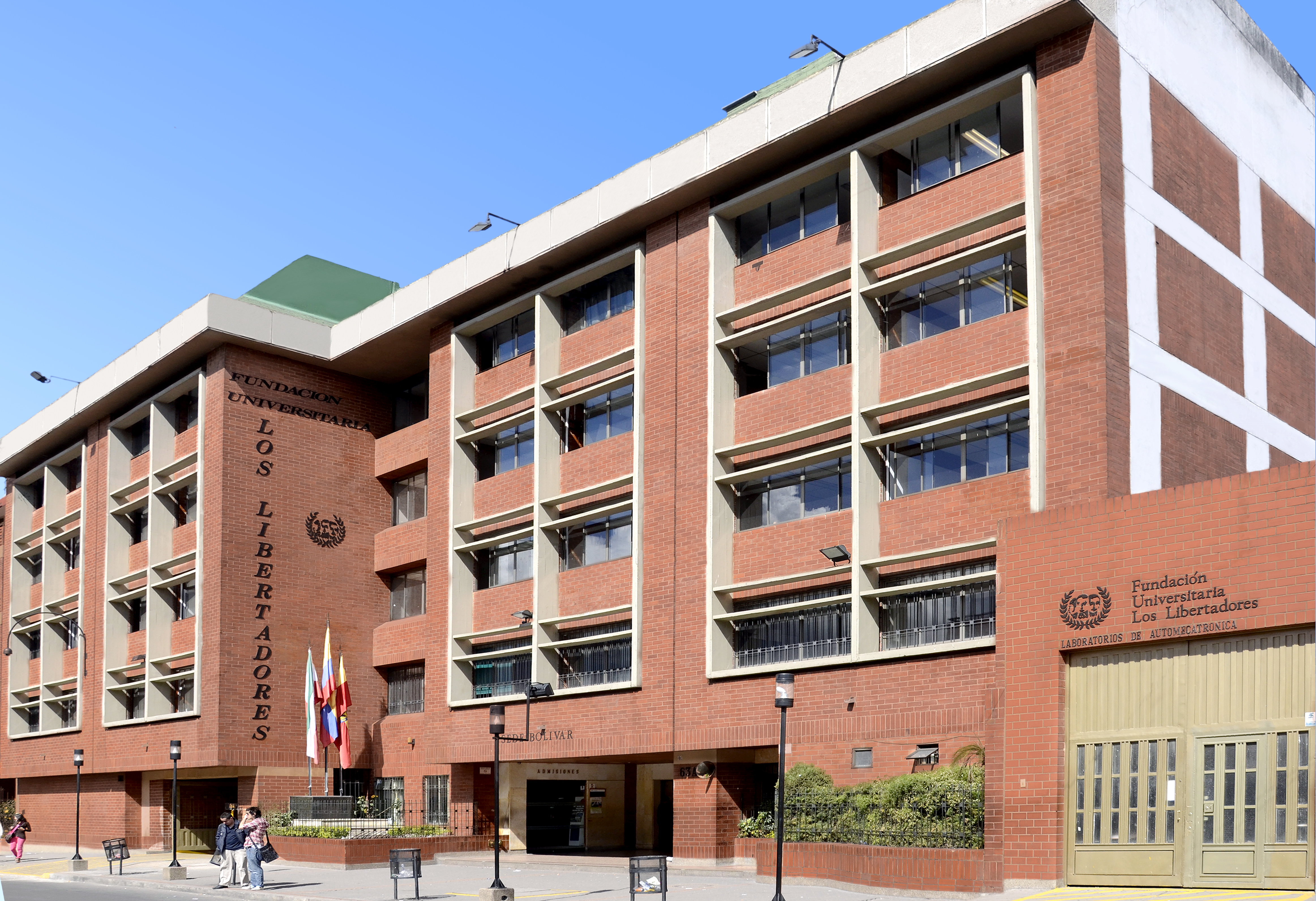 Fachada de la Fundación Universitaria Los Libertadores